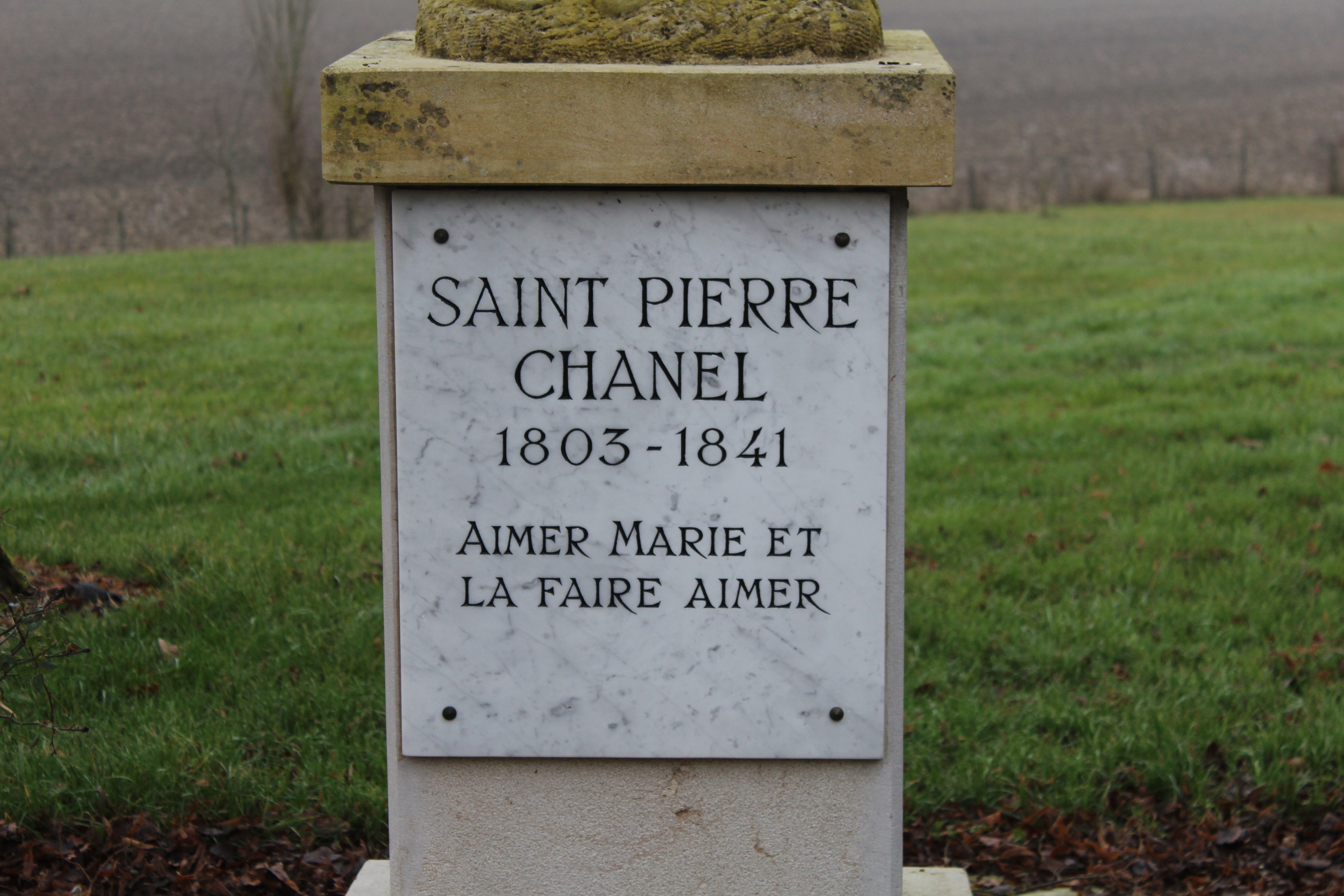 Statue de Saint Pierre Chanel à Cuet, Montrevel-en-Bresse.